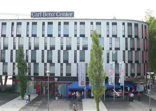 Nordansicht Carl Benz Center in Stuttgart